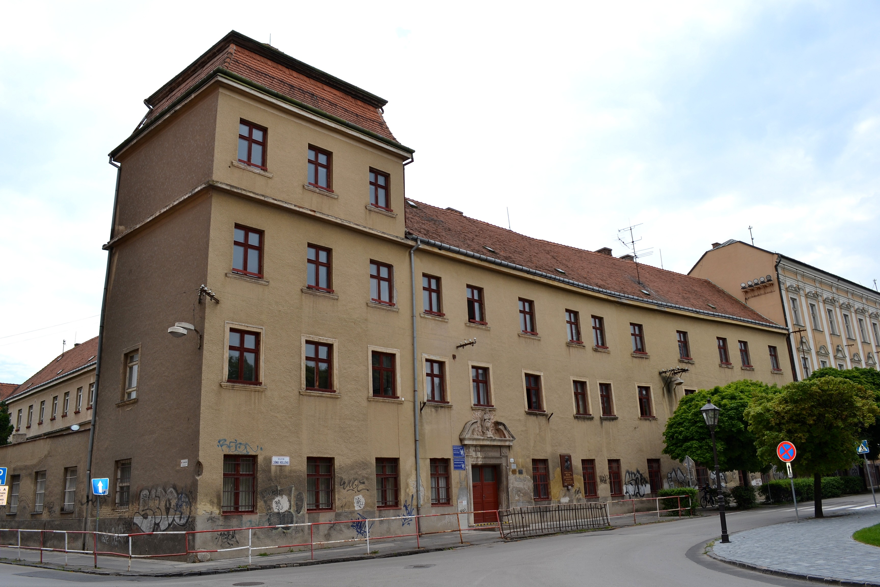 Trnava, komplex univerzitných budov; budova Seminára svätého Vojtecha (Adalbertinum)